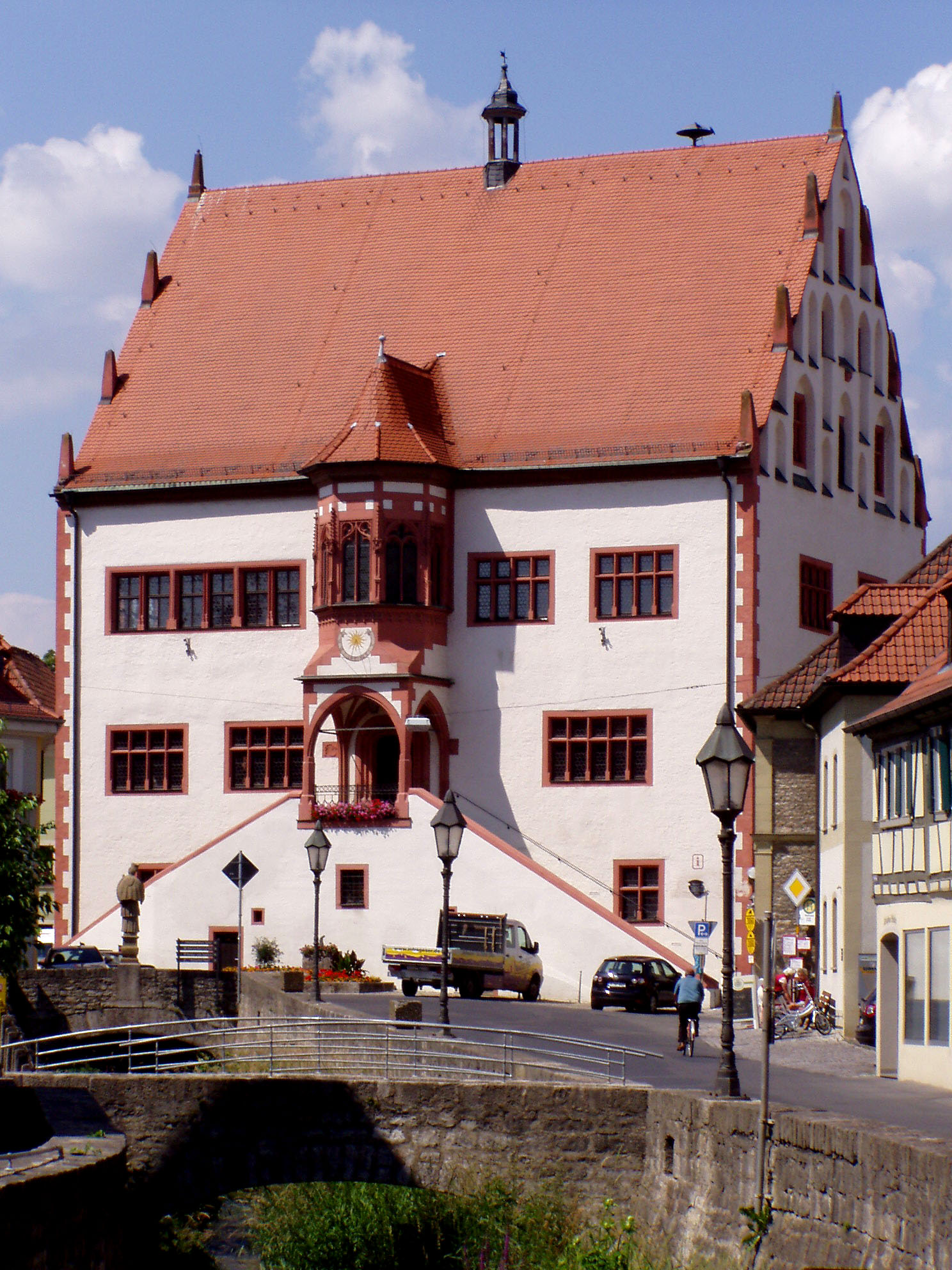 Das mittelalterliche / Unterfranken